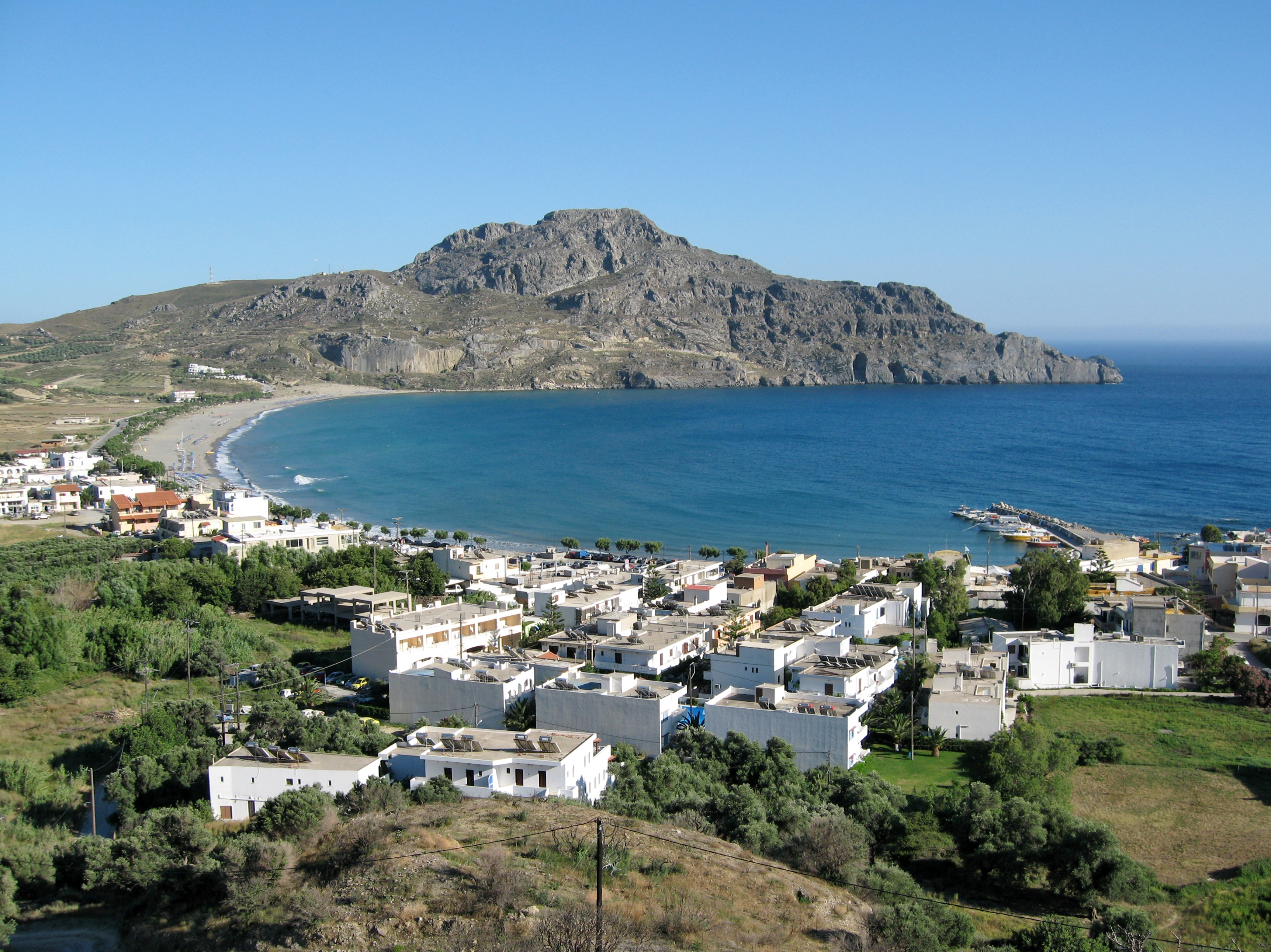 Plakias, Dimos Finikas, Nomos Rethymno, Crete, Greece